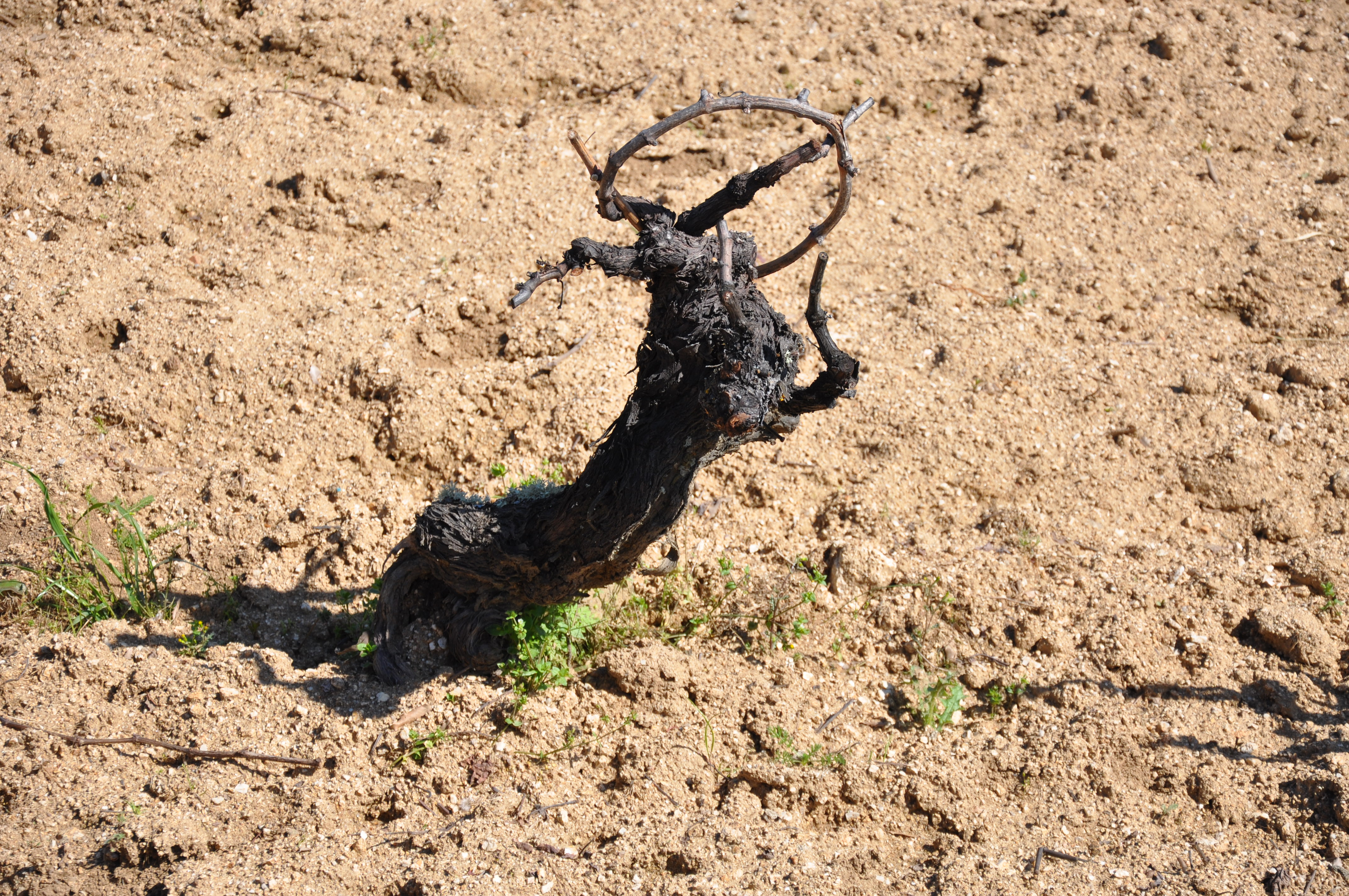 Cepa vieja, Miranda do Douro, Portugal.